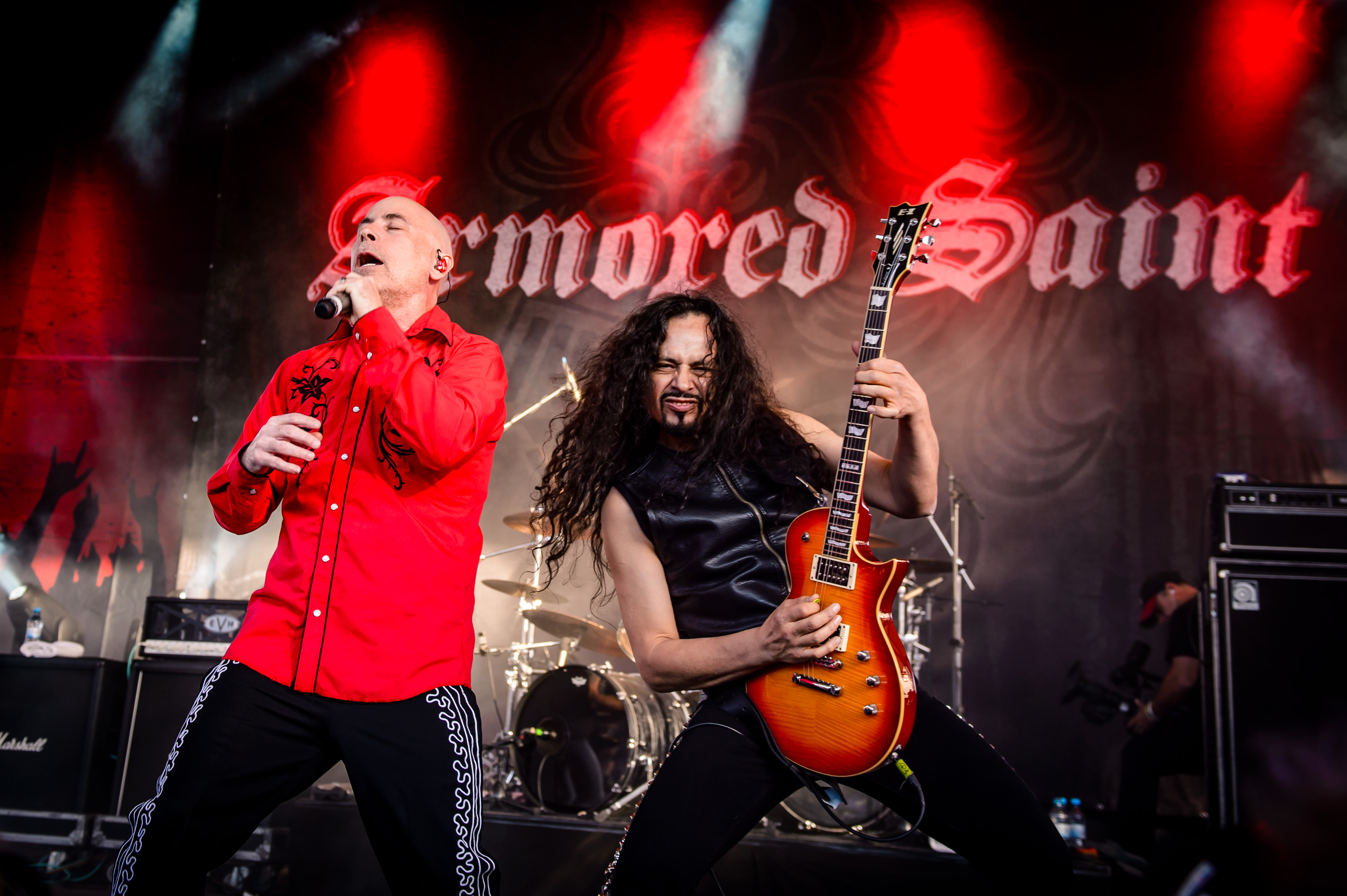 'Rock Hard Festival 2018; Amphitheater Gelsenkirchen': 'Armored Saint'